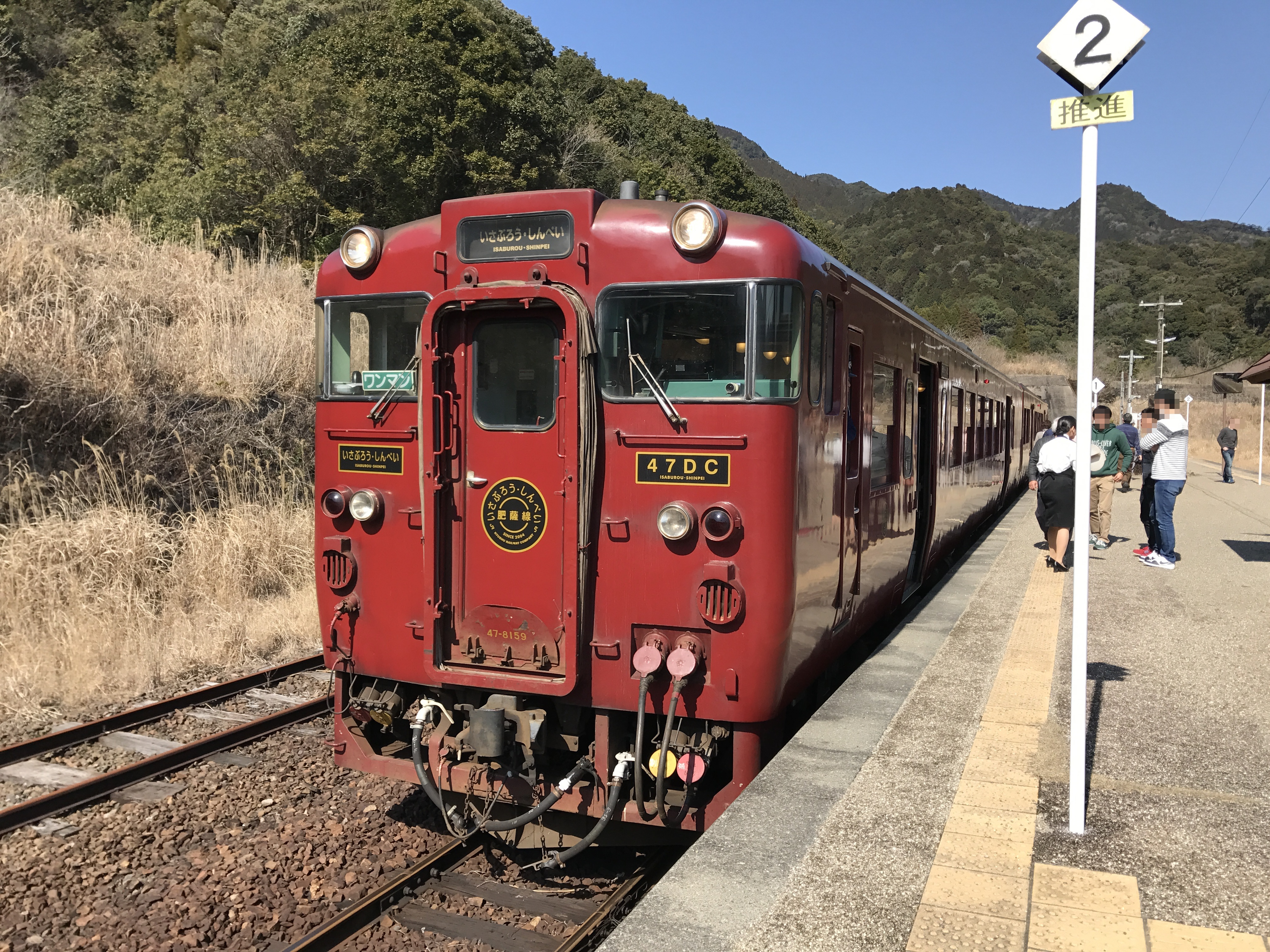 真幸駅にて停車中の特急「いさぶろう・しんぺい」